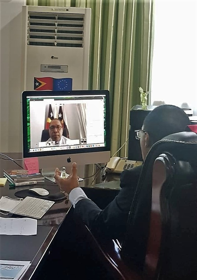 Dionísio Babo Soares bei einer Telekonferenz